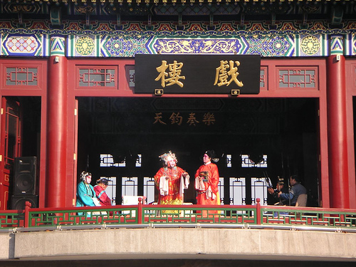 天津戏楼